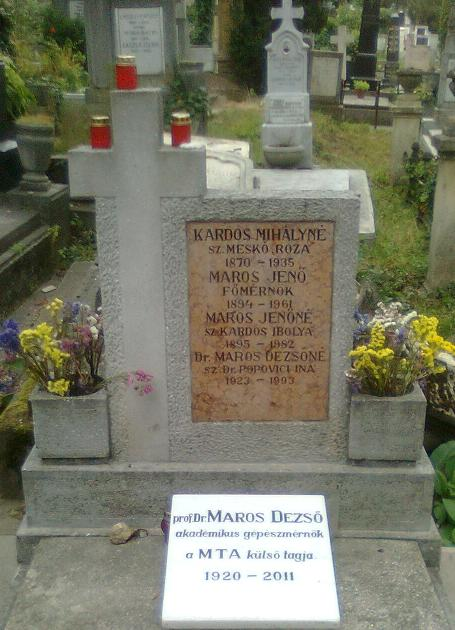 Maros Dezső kolozsvári romániai magyar gépészmérnök, egyetemi tanár, a Magyar Tudományos Akadémia külső tagjának sírja